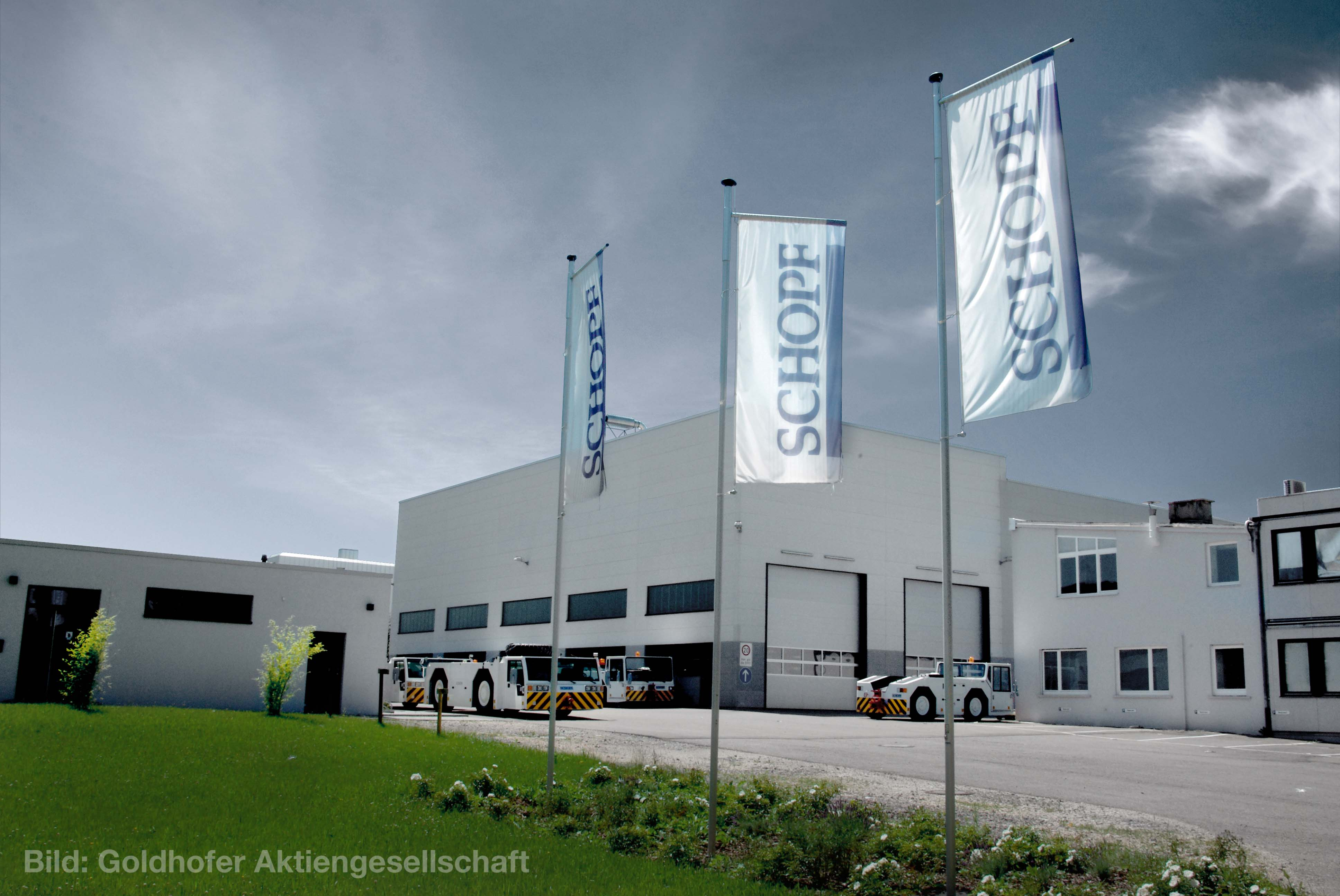 Das Betriebsgelände der Schopf Maschinenbau GmbH in Ostfildern